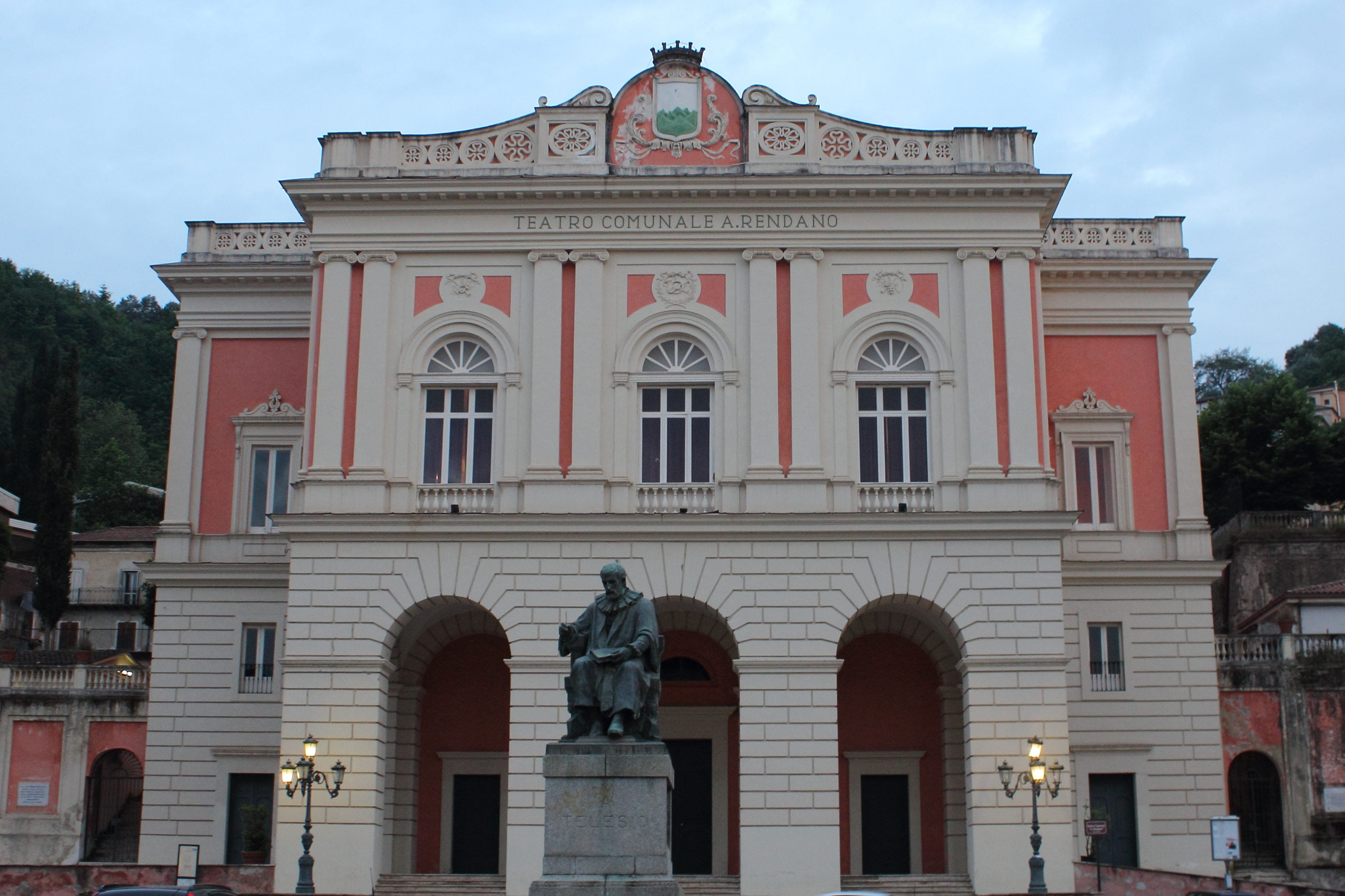 Teatro Alfonso Rendano This is a photo of a monument which is part of cultural heritage of Italy.